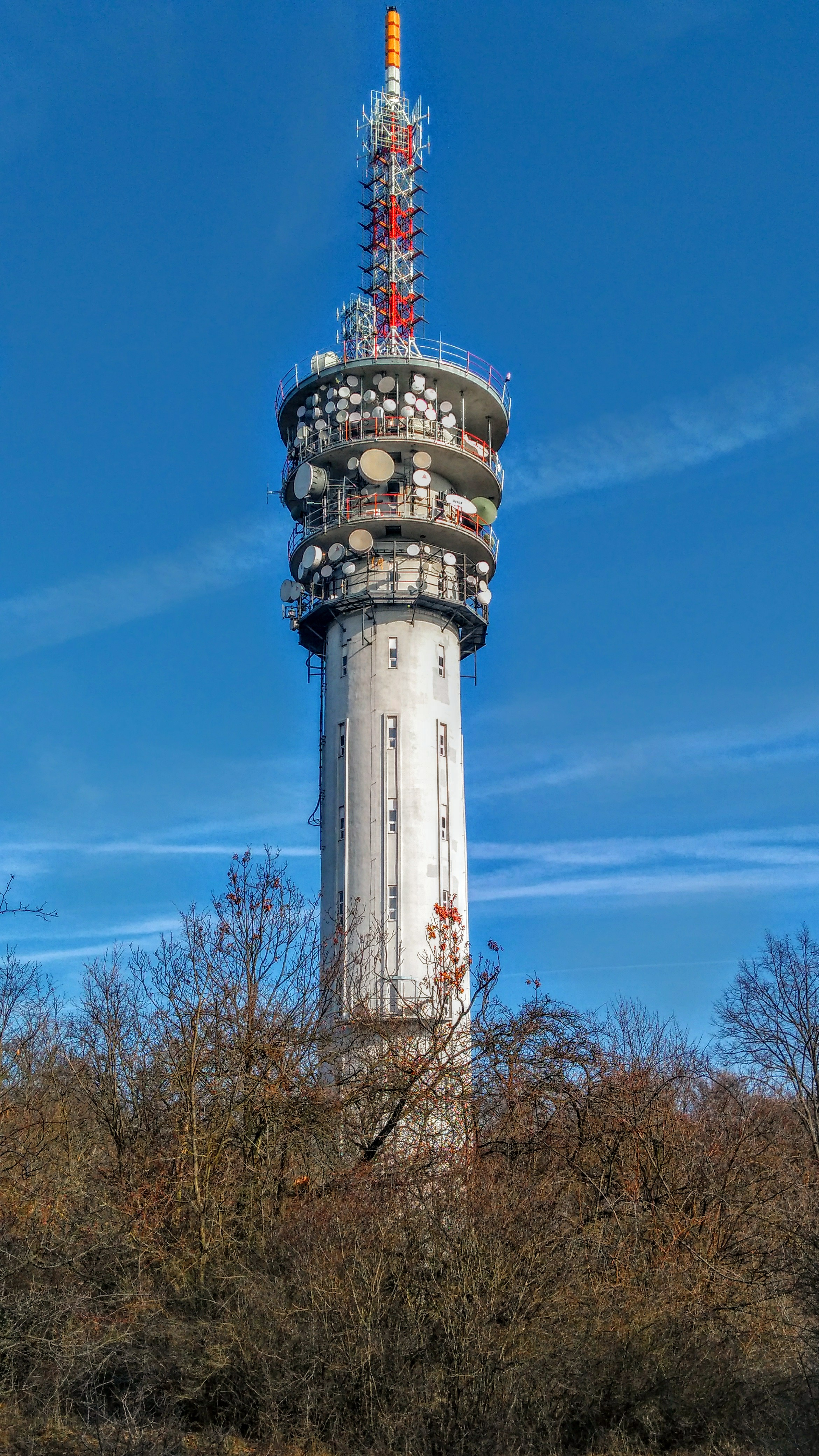 Vysílač.